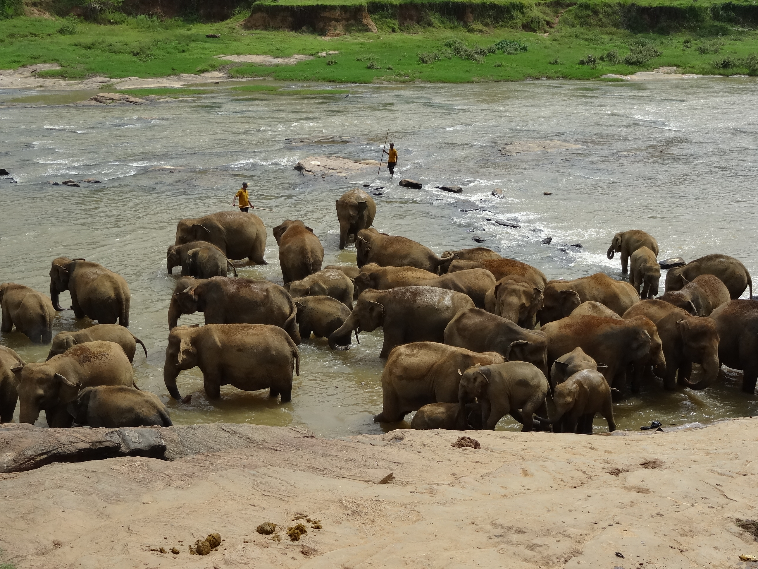 Pinnawala Elephant Orphanage